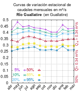 Curva de Variación Estacional del río Guallatire en Guallatire. # cita publicación # | apellido = Dirección General de Aguas # | nombre = # | enlace-autor = Ministerio de Obras Públicas (Chile) # | título = Diagnóstico y clasificación de los cursos y cuerpos de agua según objetivos de calidad. Cuenca Río Guallatire # | ubicación = Santiago de Chile # | editorial = Ministerio de Obras Públicas (Chile) # | año = 2004 # | edición = # | url = # | urlarchivo = # | fechaarchivo = # | ref = harv # Tabla 4.4 (m3/s) pág. 33 mes 5% 10% 20% 50% 85% 95% abr 0.424 0.405 0.382 0.339 0.285 0.253 may 0.485 0.436 0.389 0.327 0.284 0.268 jun 0.444 0.426 0.403 0.360 0.306 0.275 jul 0.454 0.435 0.412 0.368 0.313 0.281 ago 0.438 0.421 0.400 0.361 0.313 0.285 sep 0.434 0.415 0.392 0.348 0.294 0.262 oct 0.425 0.402 0.377 0.332 0.285 0.260 nov 0.403 0.387 0.369 0.333 0.290 0.264 dic 0.403 0.387 0.368 0.331 0.286 0.259 ene 0.461 0.425 0.391 0.342 0.305 0.291 feb 0.429 0.410 0.388 0.345 0.292 0.261 mar 0.436 0.417 0.394 0.349 0.294 0.262 This plot was created with Gnuplot.